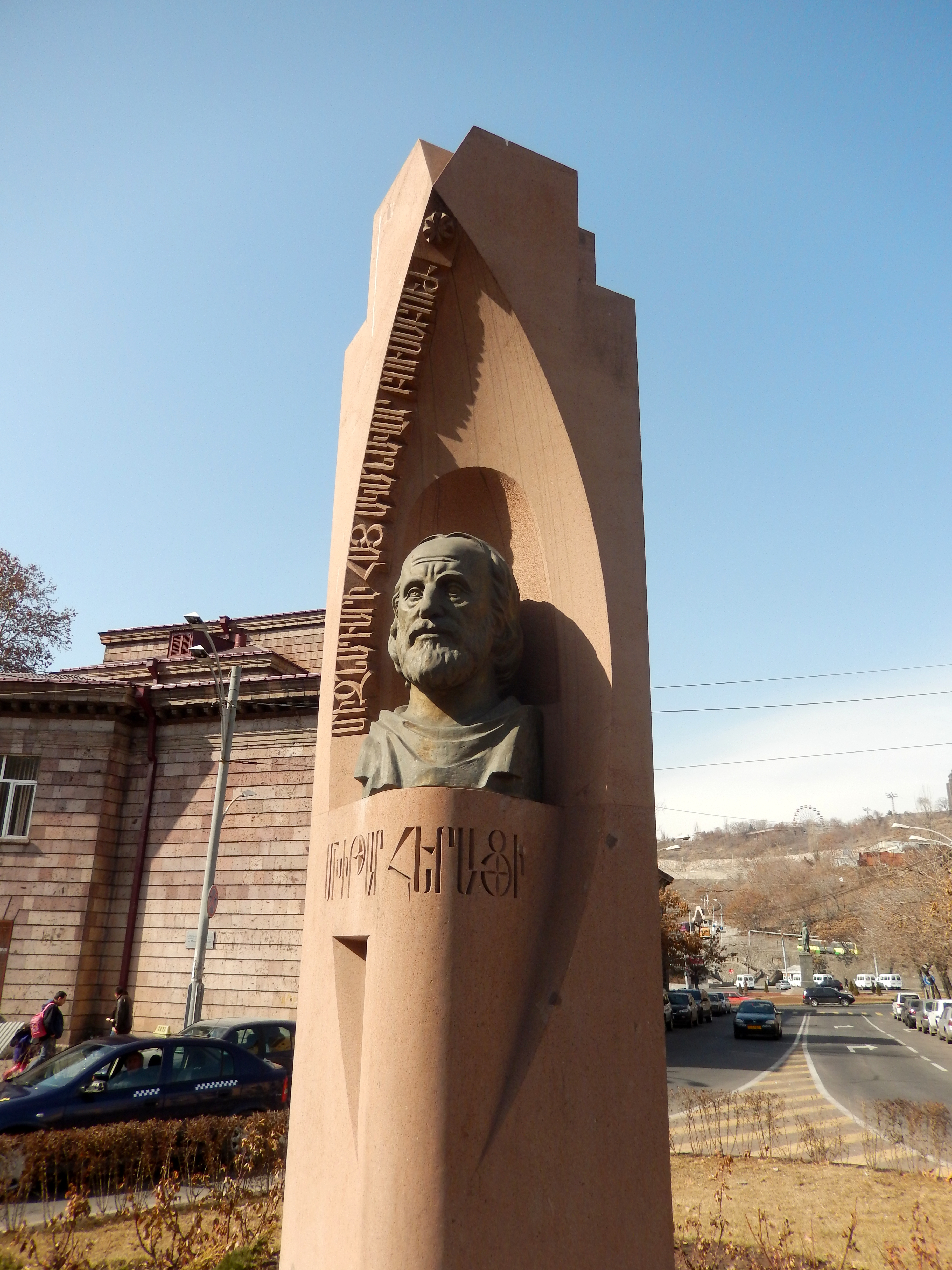 Քանդակագործ` Յուրի Պետրոսյան, ճարտարապետ` Ասլան Մխիթարյան